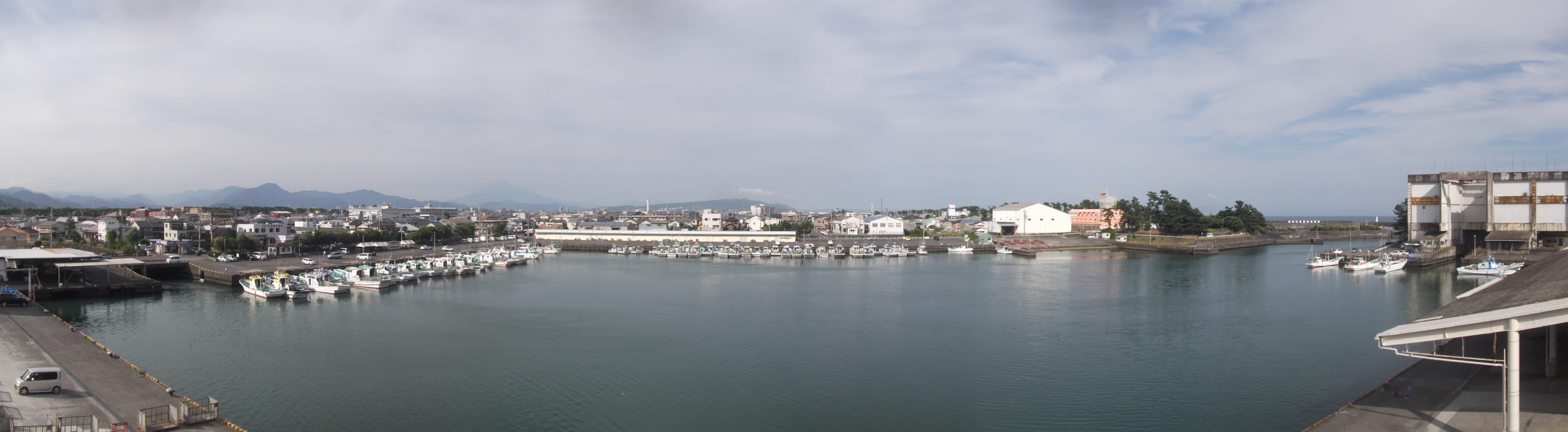 用宗漁港のパノラマ。津波避難タワーから撮影。